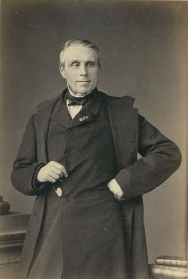 Charles Kolb-Bernard (1798-1888), député du Nord